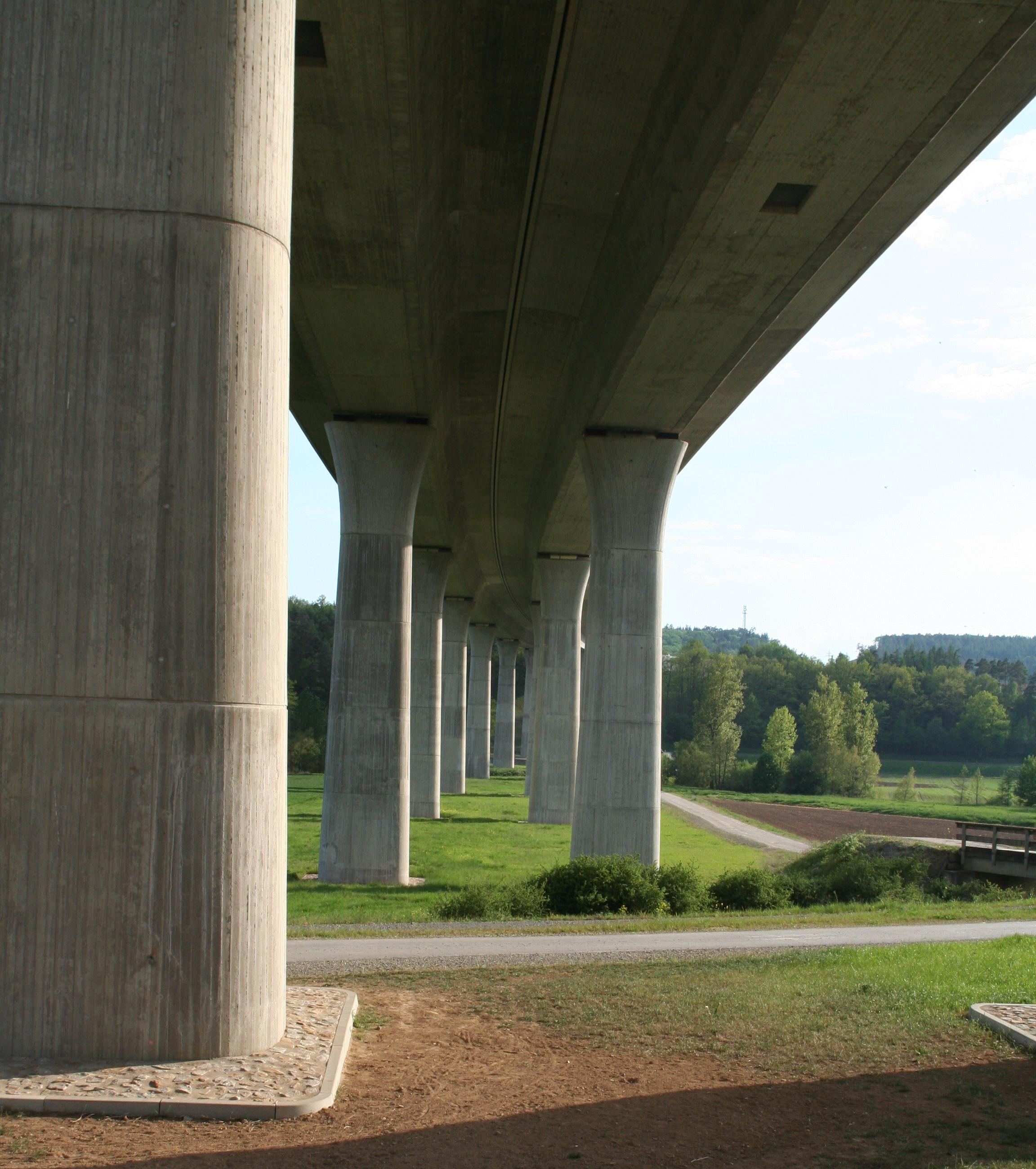 Untersicht der Saaletalbrücke der A71 bei Neustadt an der Saale in Unterfranken